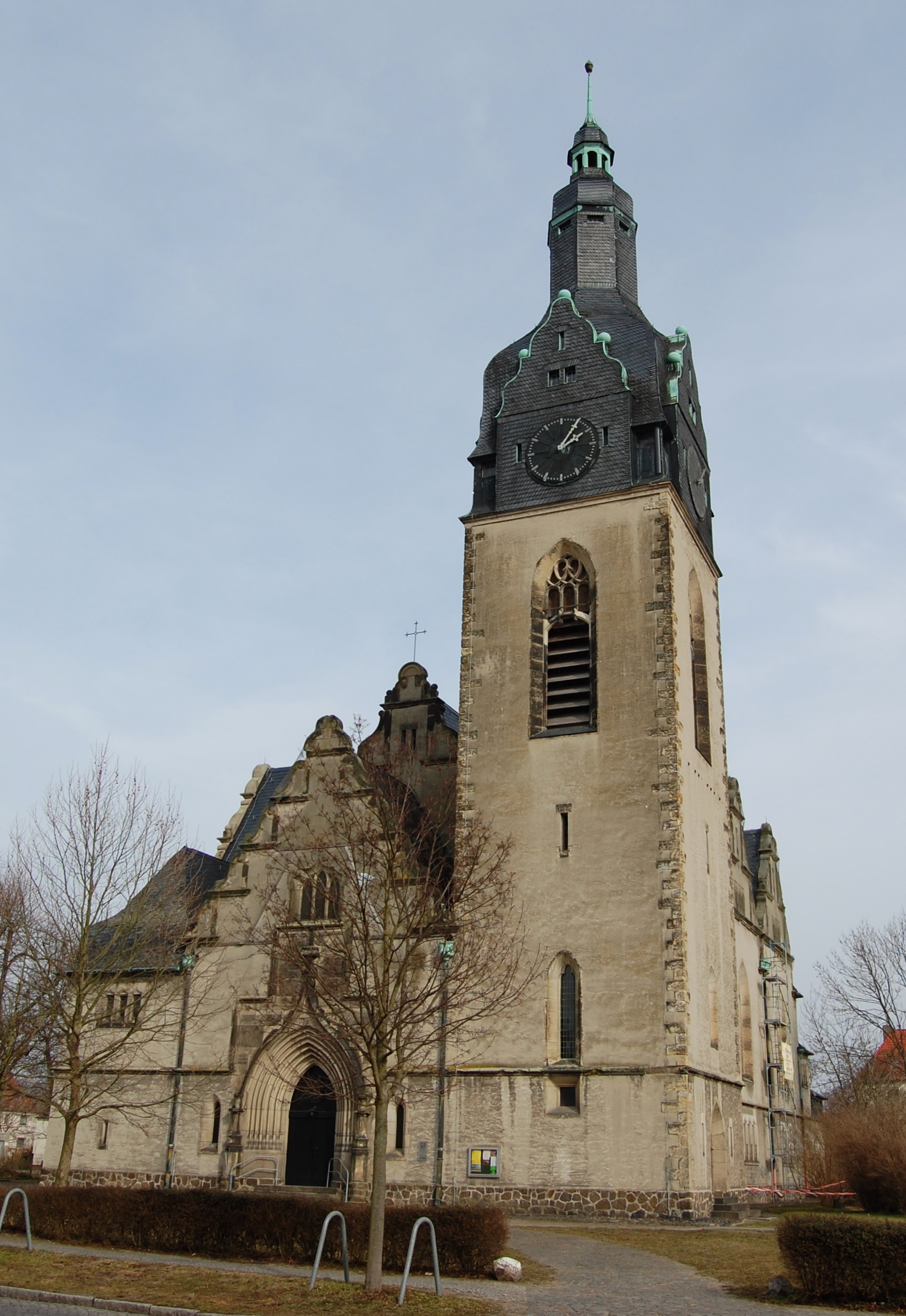 Christuskirche Wittenberg, Vorstadt Kleinwittenberg (nicht Piesteritz)